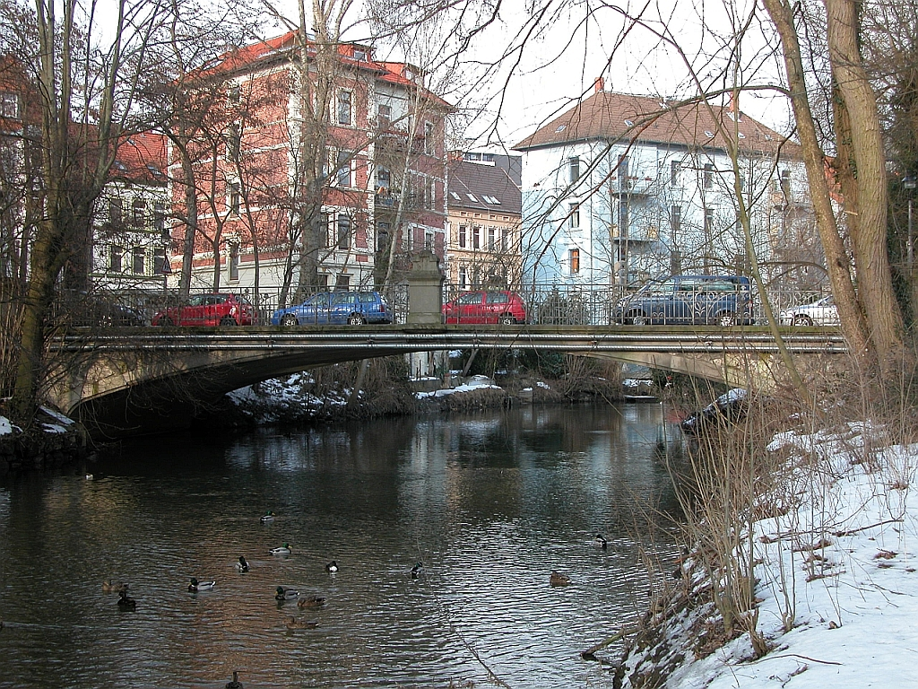 Braunschweig: Gauß-Brücke von Südwesten gesehen.